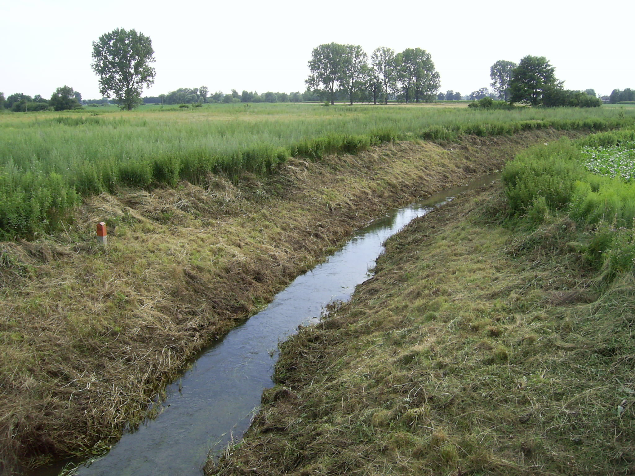 Zimna Woda na północnej granicy Brwinowa z Biskupicami, z mostka na drodze wojewódzkiej 720 do Błonia